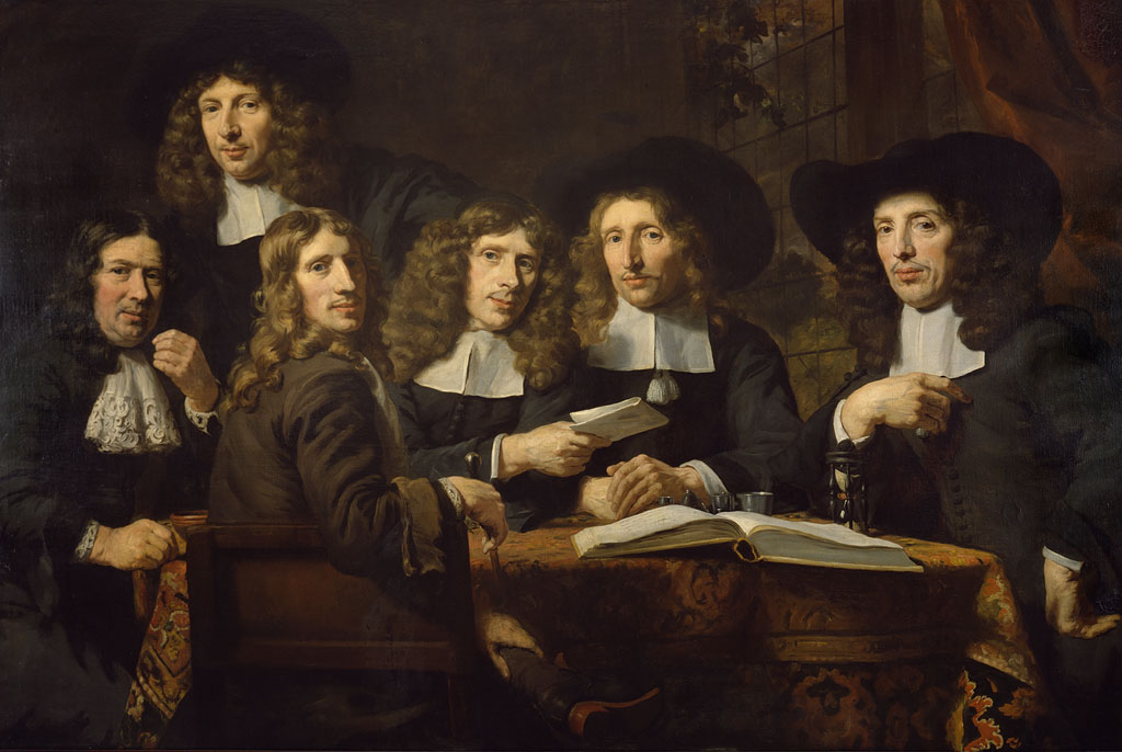 schilderij; Chirurgijnsgilde; portret; groepsportret; regentenstuk; Bidloo, Govert; Koenerding, Jan; Verhul, Gerard Hendricksz.; Muyser, Pieter; Ciprianus, Allardus; Hartman, Isaack Hendricksz.